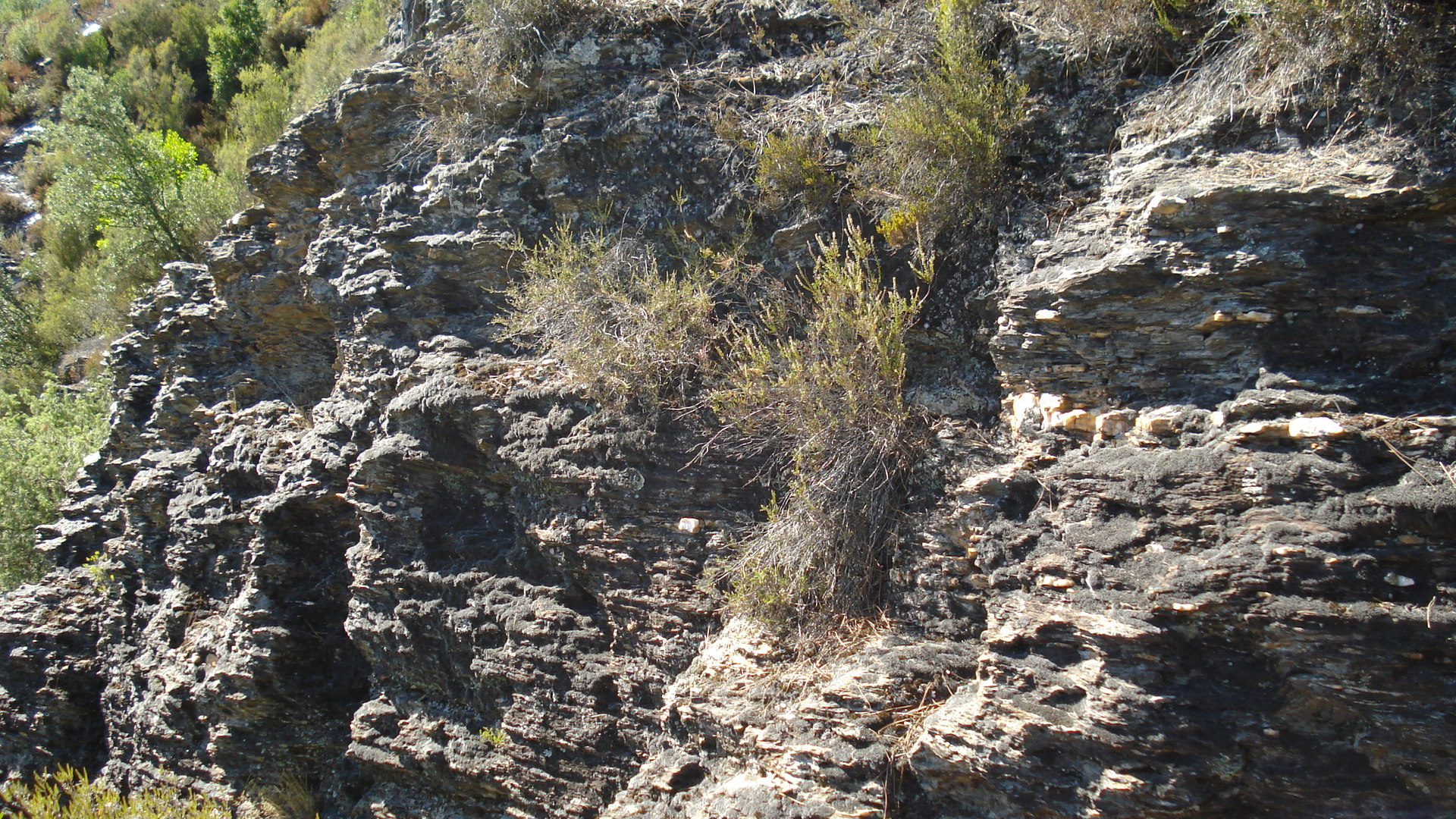 coupe de roche : schiste, micaschiste et quartz. montagne de la vielle morte. Saint-Etienne-Vallée-Française Lozère France